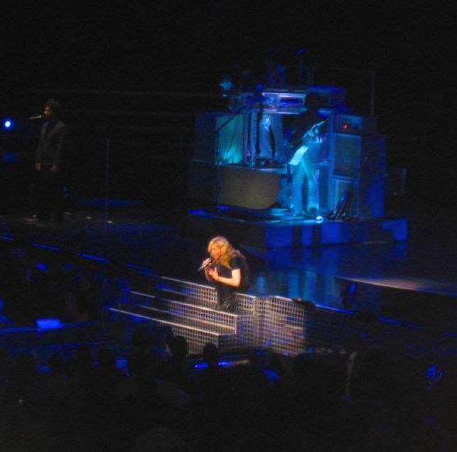 substitute for love